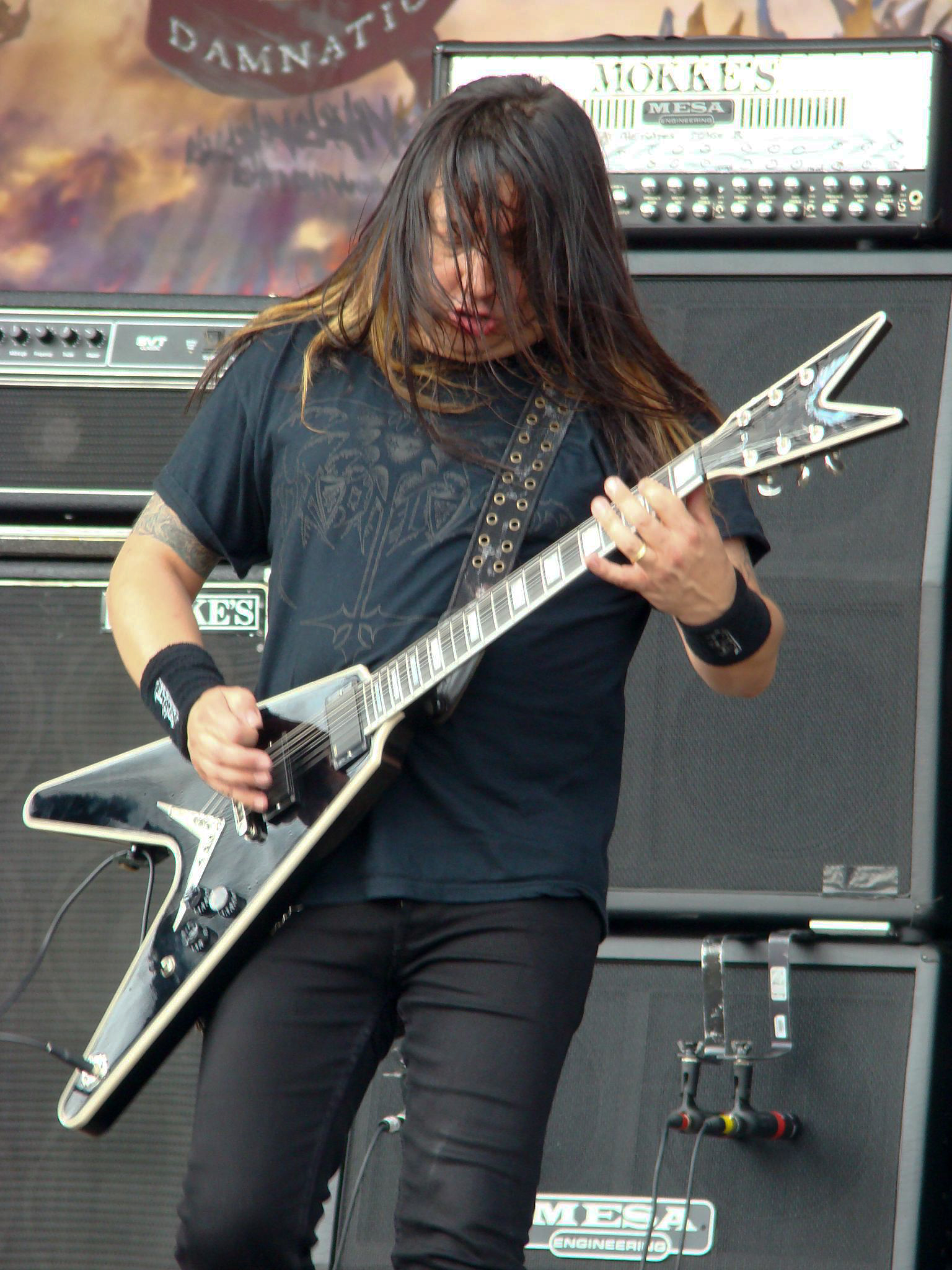 Eric Peters from Testament.